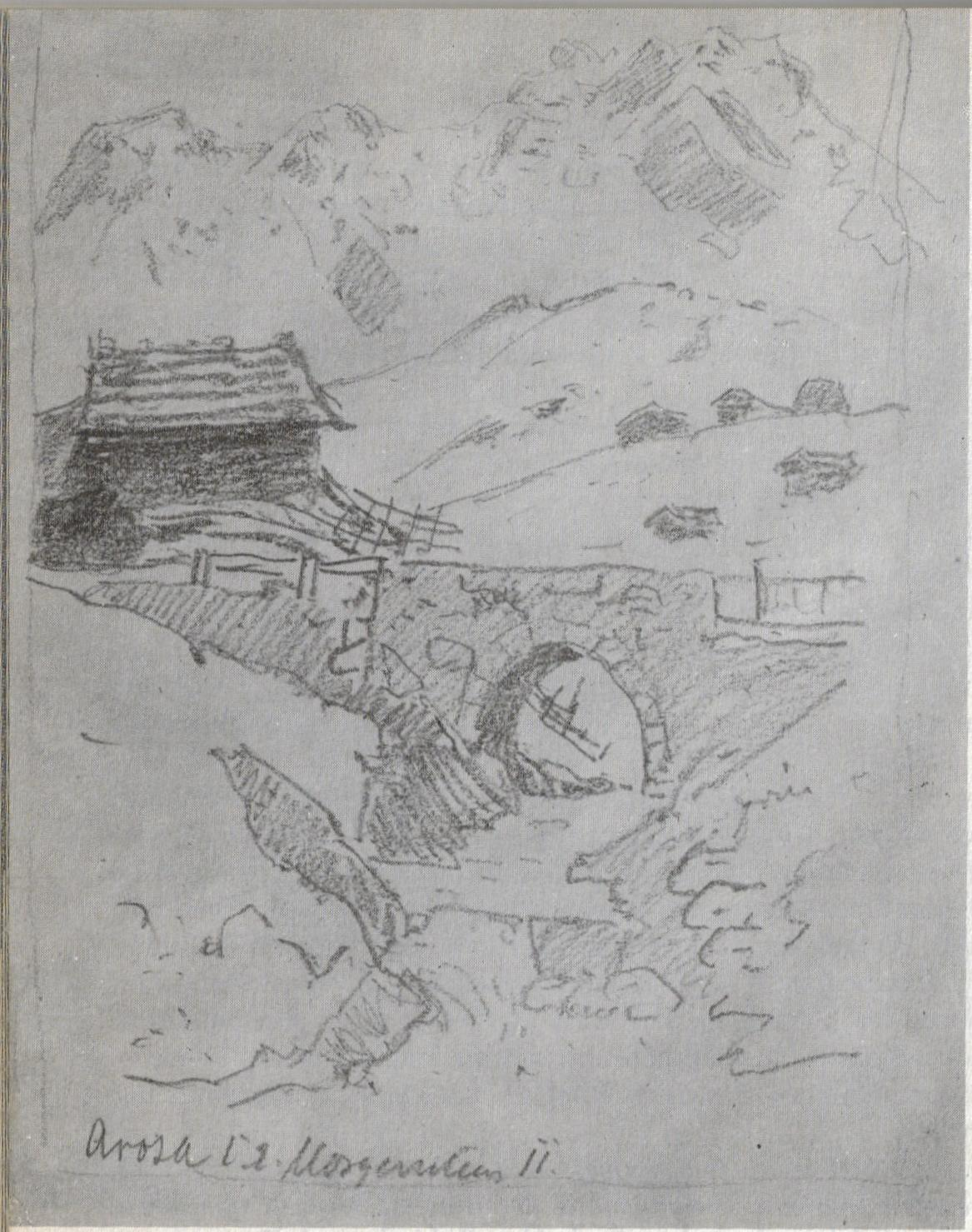 Arosa